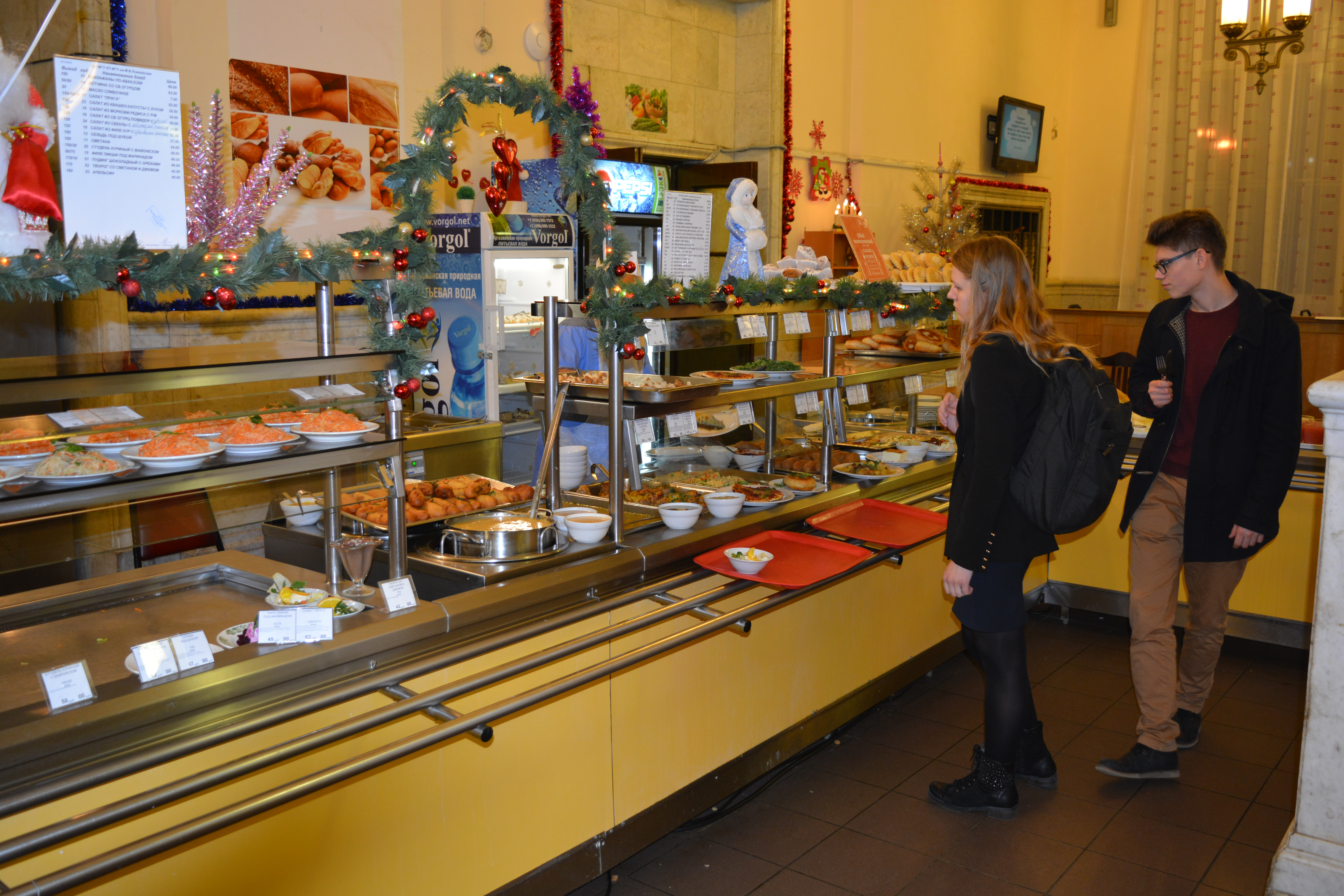 Столовая Комбината питания МГУ